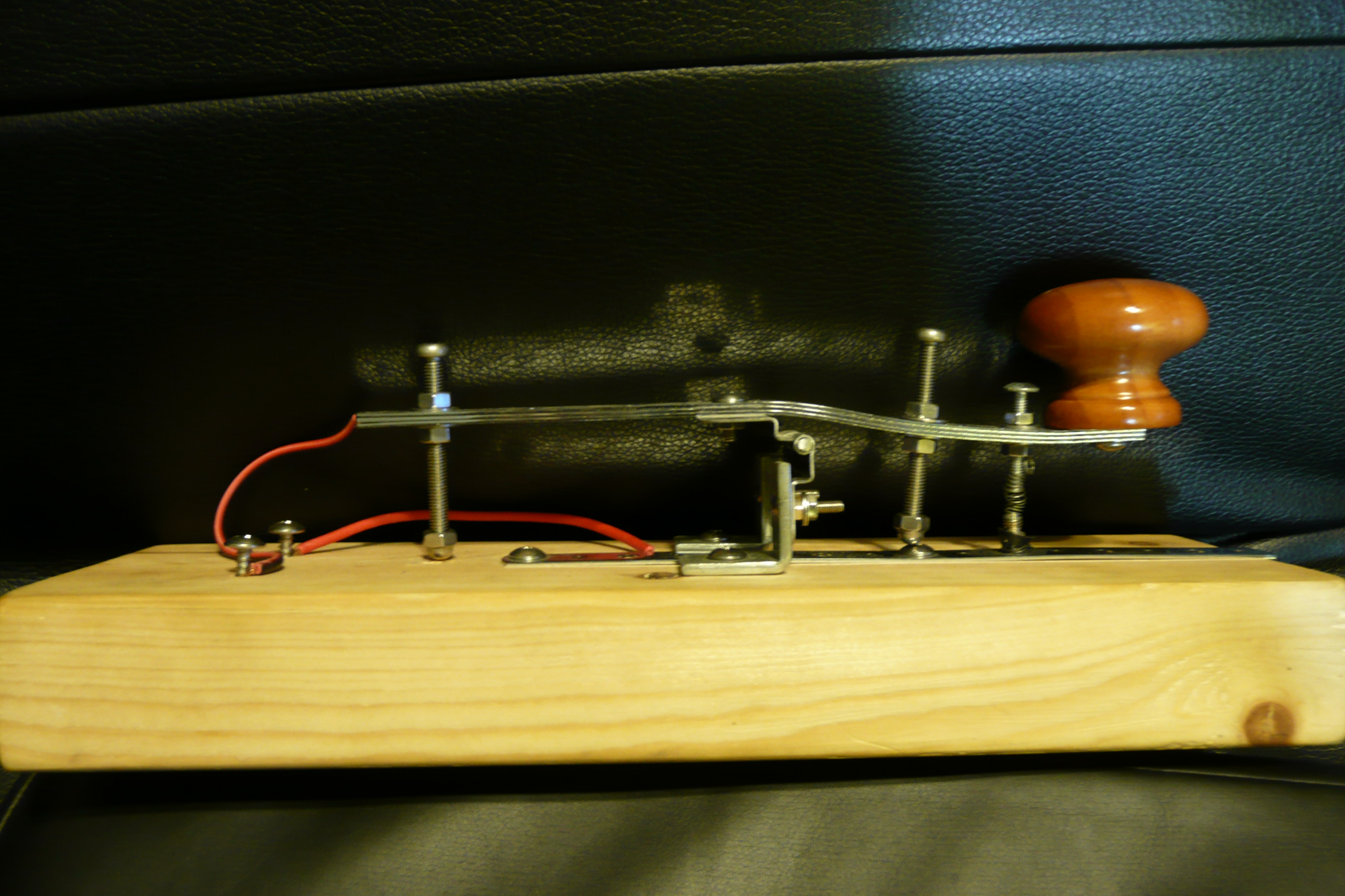 日本のアマチュア無線家が廃材や身近な材料を使って製作した電鍵の一例。既製品を購入せずとも、自作により電信の運用が可能である。